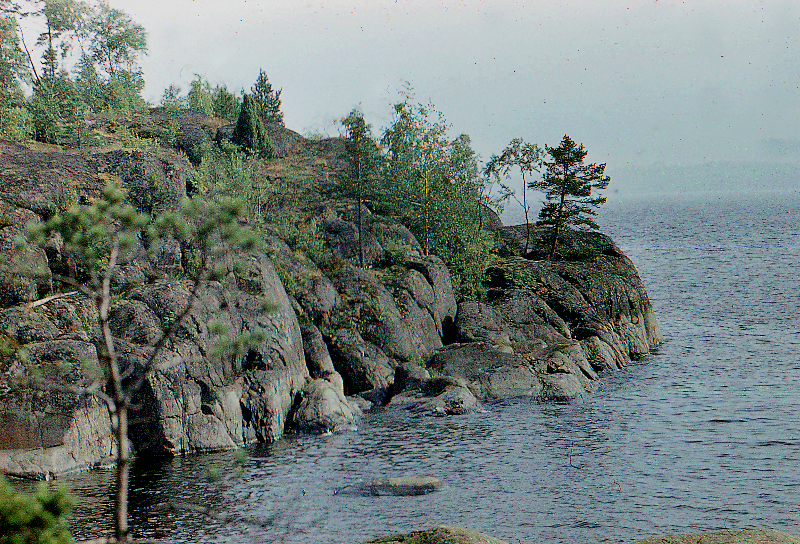 Lake Ladoga.Patasaari island.